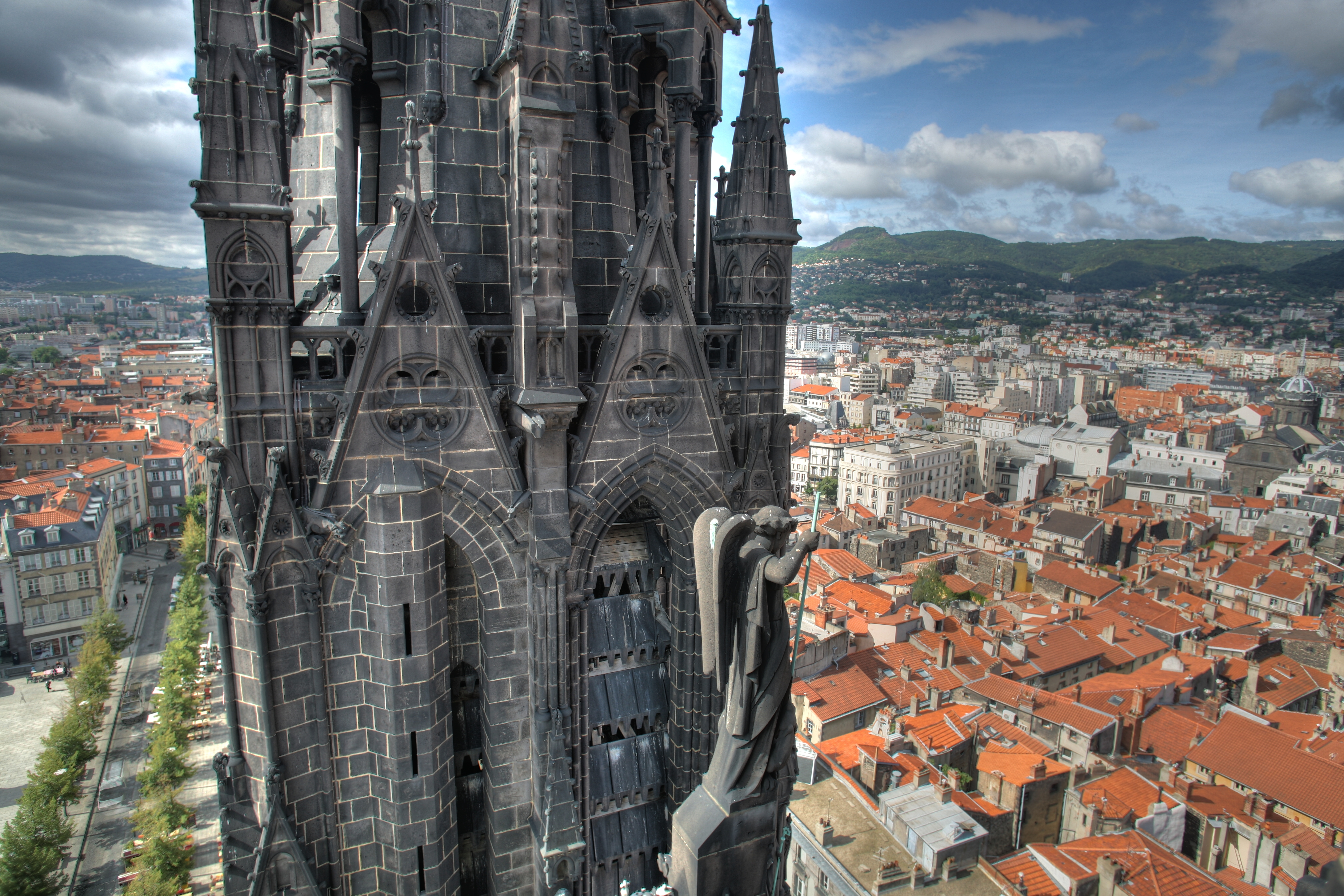 Flèche Sud de la Cathédrale Notre-Dame de l'Assomption, Clermont-Ferrand. Traitement HDR.